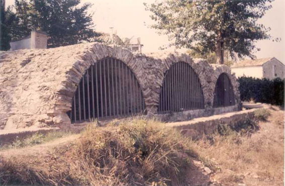 Baños árabes (Torres Torres)